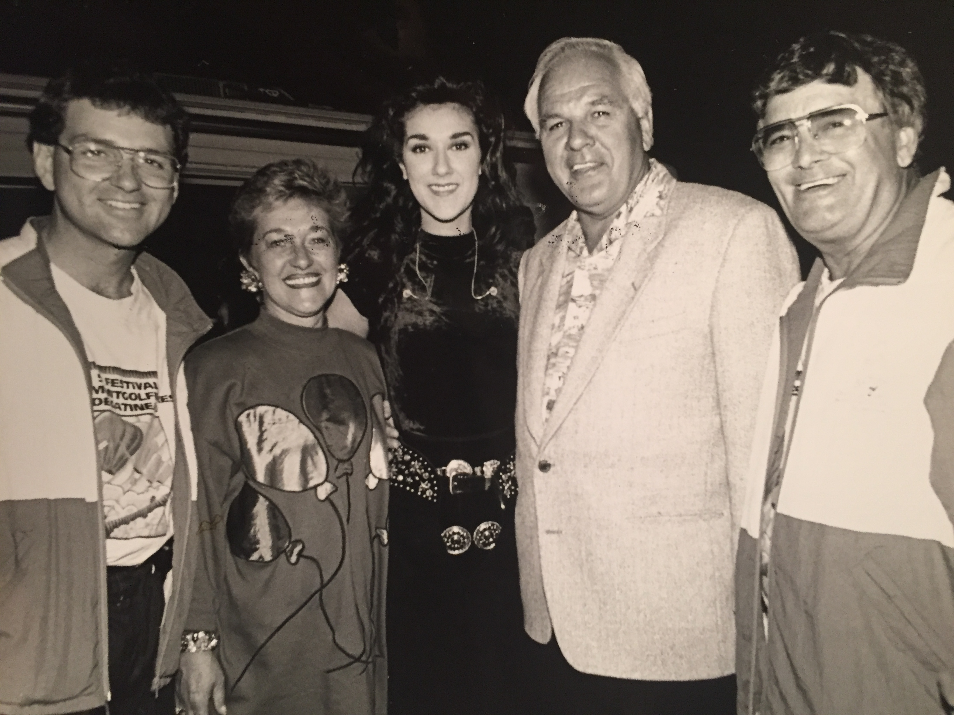 Celine Dion au Festival de montgolfières de Gatineau en 1992